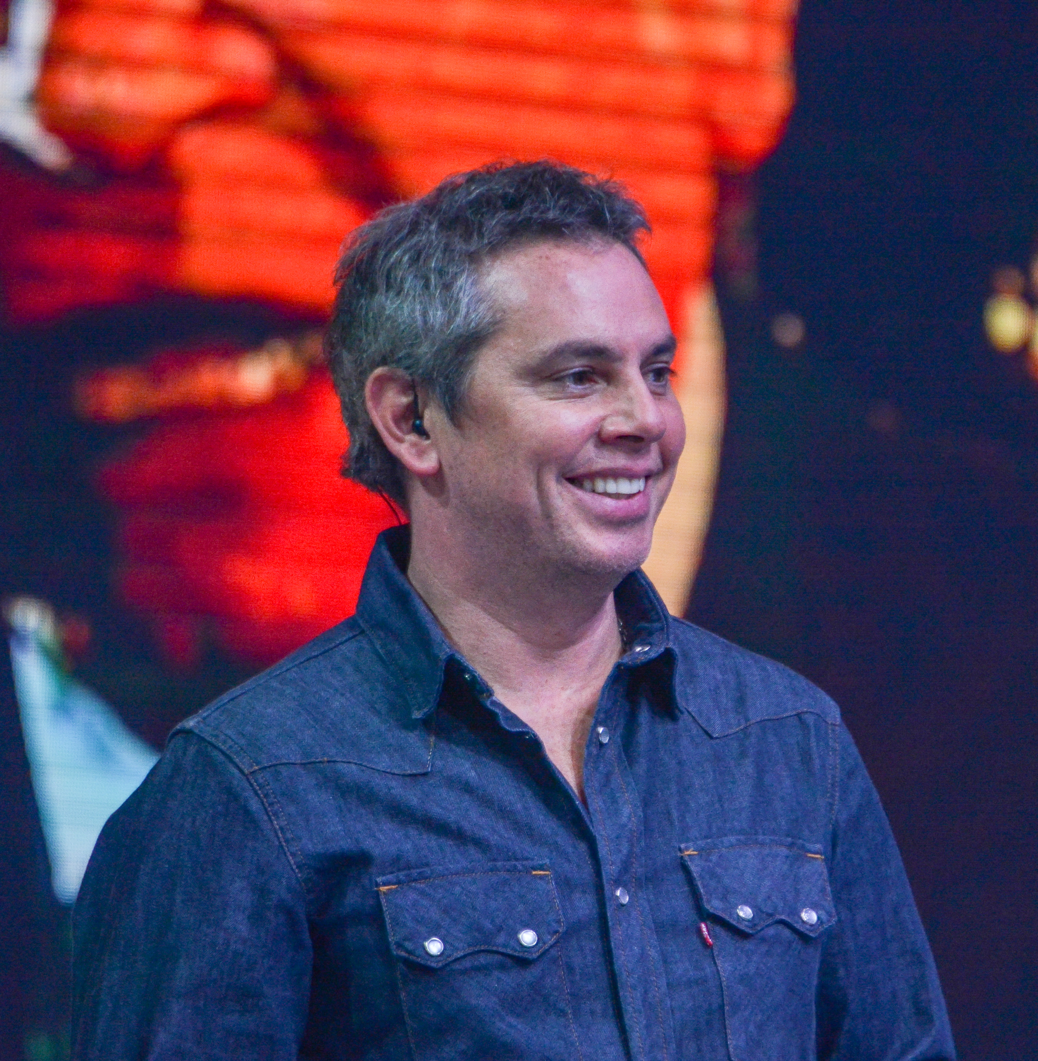 Teletón 2017